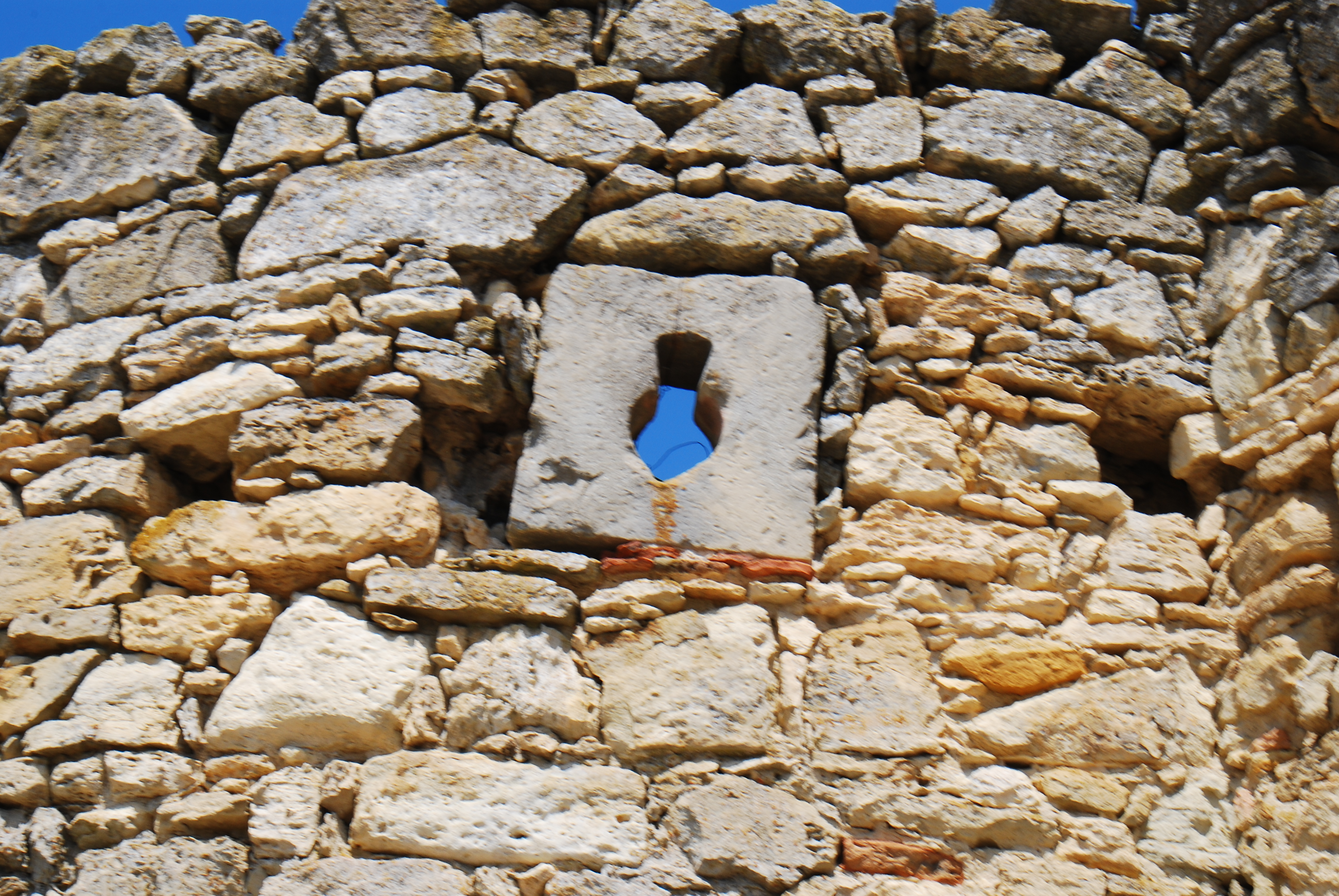 Zid de incintă 03